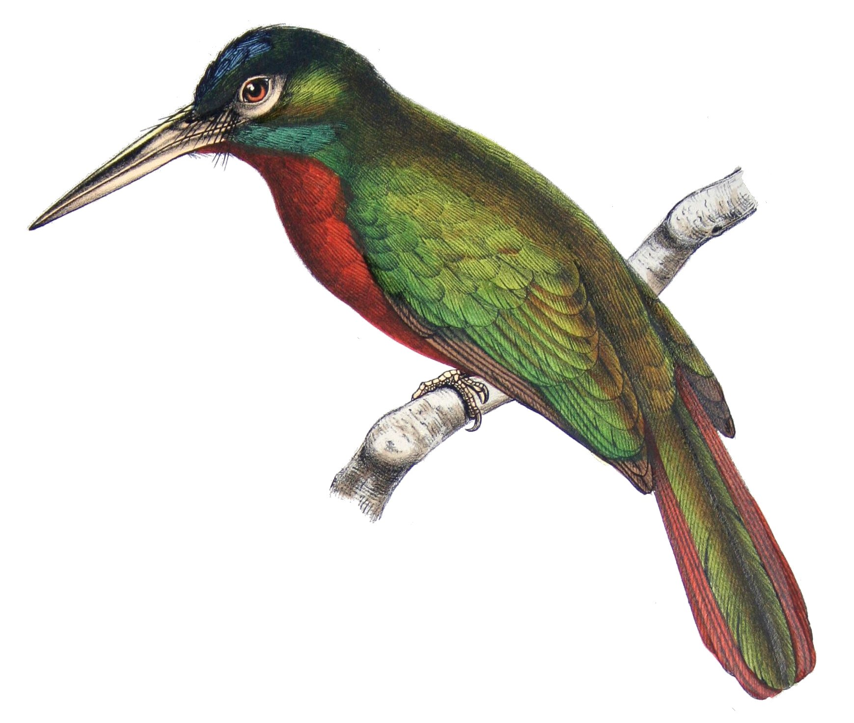 Maracana luciani = Galbula cyanicollis